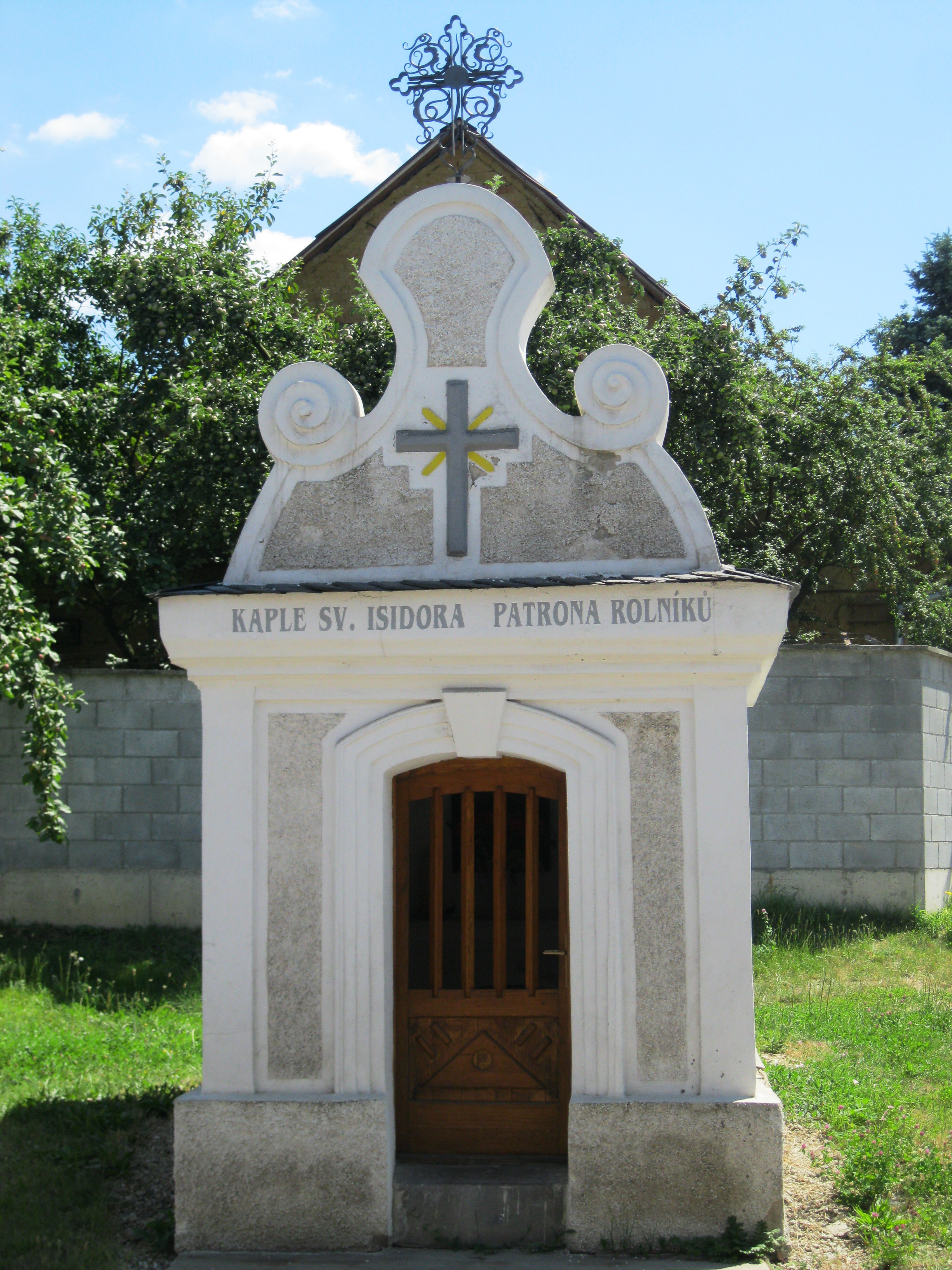 Kaple sv. Isidora, Řepčínská ul., Olomouc-Řepčín.